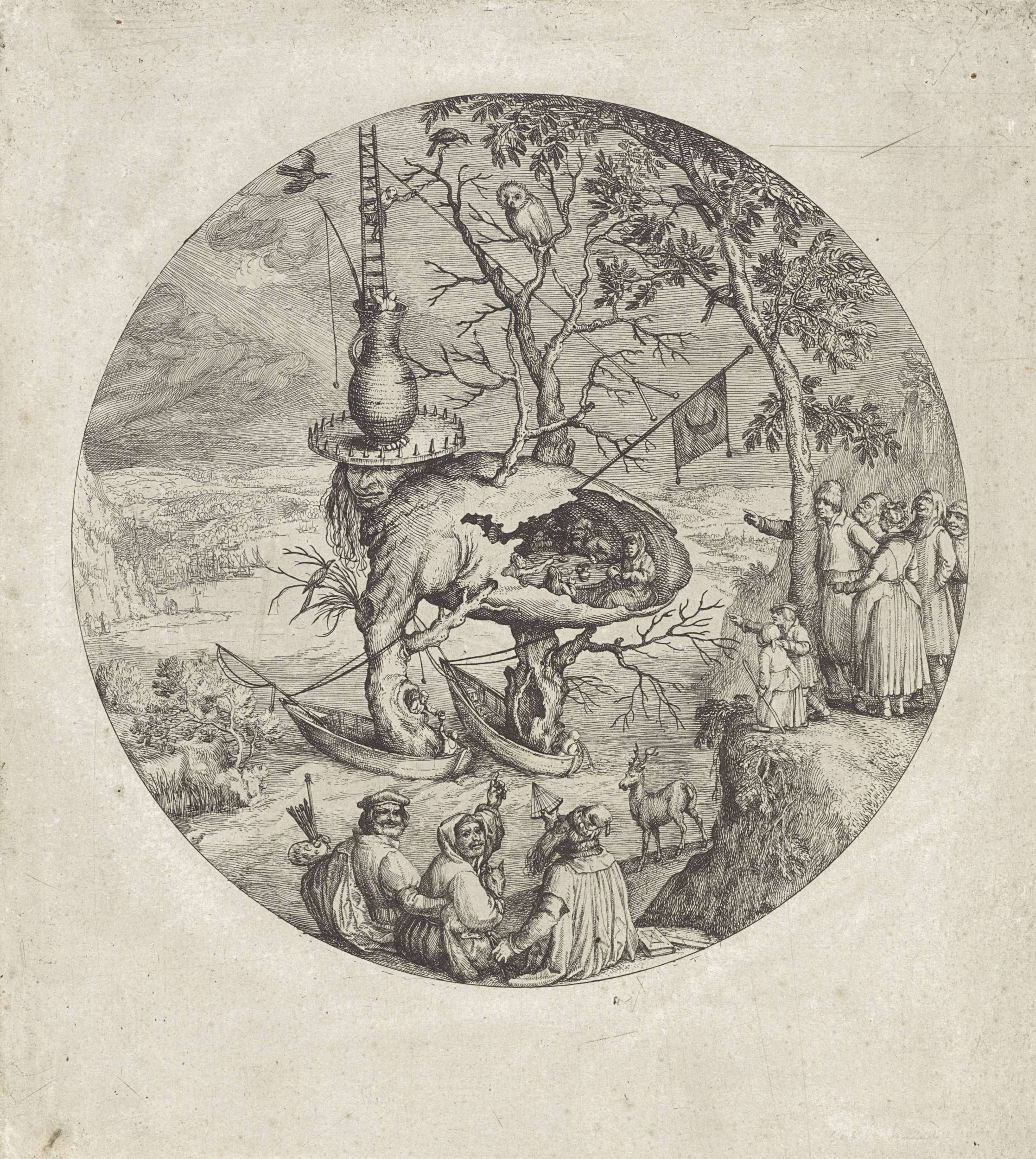 Een gedrocht, deels mens en deels boom, dobbert op twee vissersboten op een rivier in een weids landschap met daarin een hert en enkele vogels, waaronder een ooievaar en een uil. De figuur draagt een kruik op zijn hoofd. Uit de kruik klimmen twee mannen met behulp van een ladder. Door een gat in de romp van het wezen is een etend en drinkend gezelschap rond een tafel te zien. Uit het gat steekt een vlag met een halve maan, het symbool voor ongelovigheid. Rechts kijkt een groep mensen toe. Vooraan een man met schildersbenodigdheden, een vrouw met een vos en een man met mathematische hulpmiddelen.; Iconclasscode: 25GG3; Iconclasscode: 25F91; Iconclasscode: 41A773; Iconclasscode: 46C232; Iconclasscode: 25F24(DEER); Iconclasscode: 25F3; print